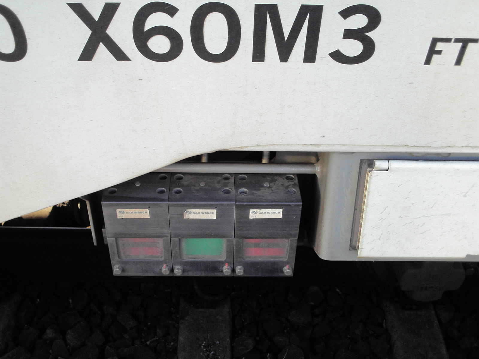 Bromsindikator X50